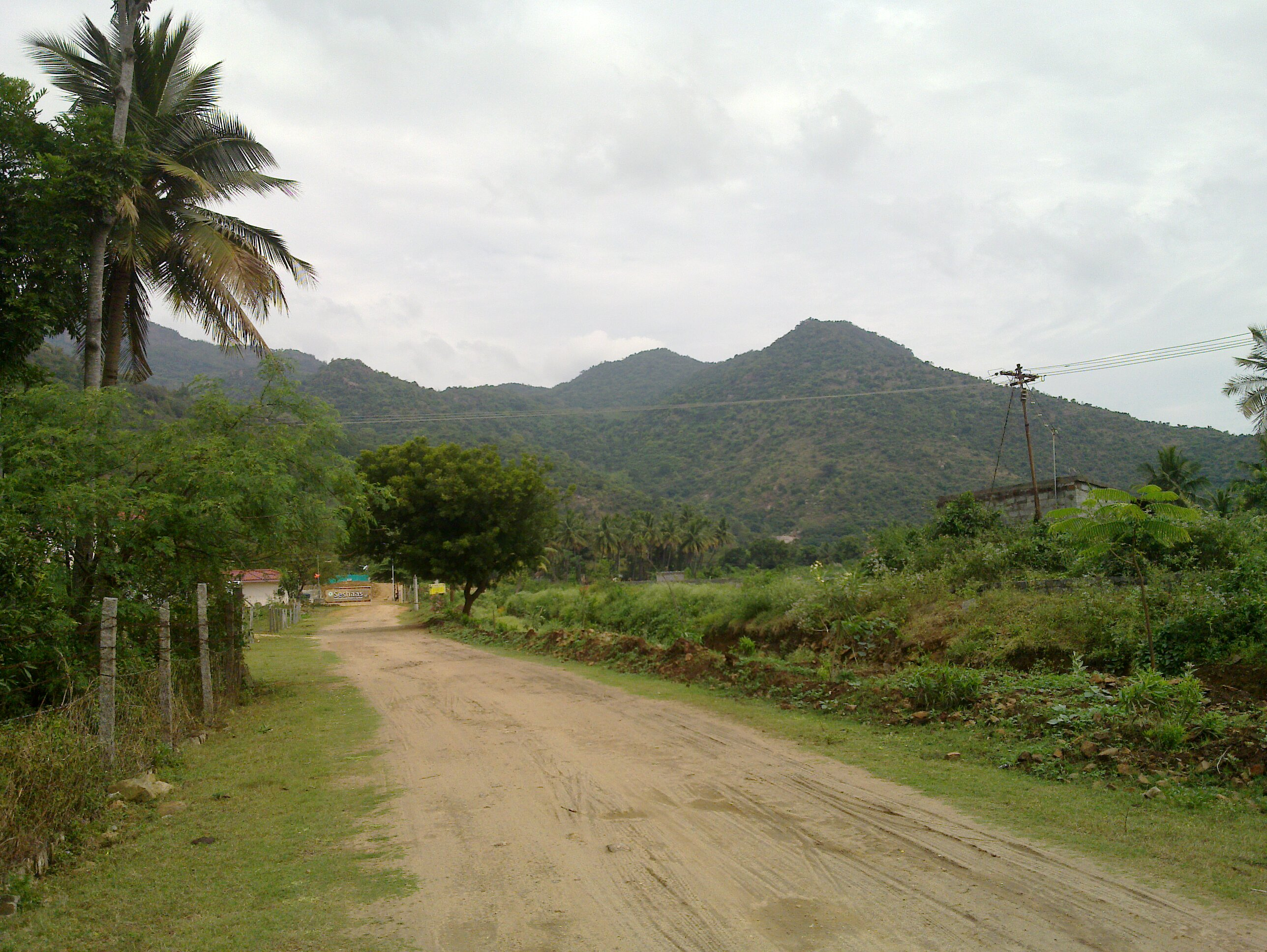 ஏற்காடு மலை-அடிவாரம் பாதை